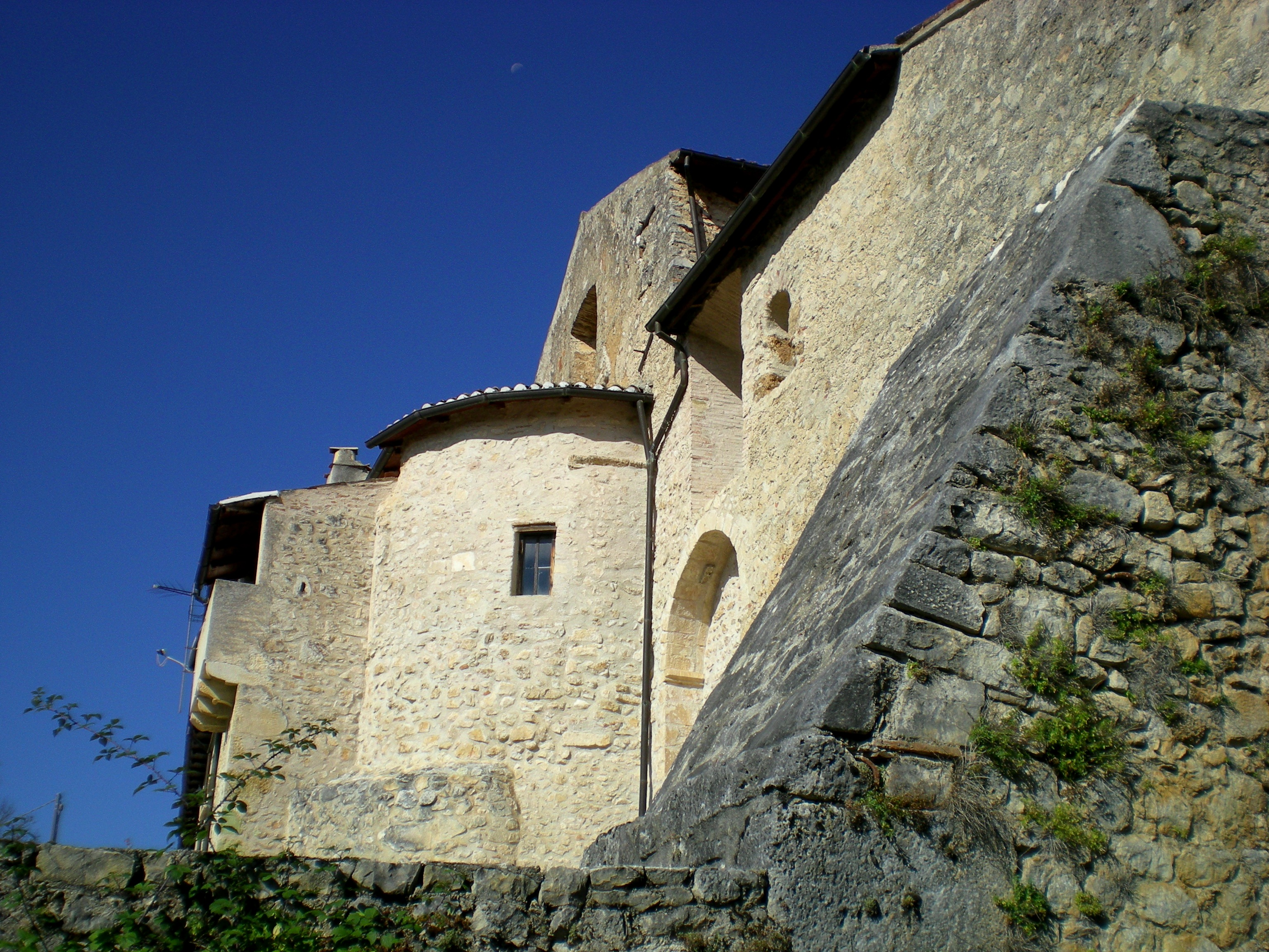 Chiesa di San Michele Arcangelo a San Vittorino (L'Aquila): vista dell'abside